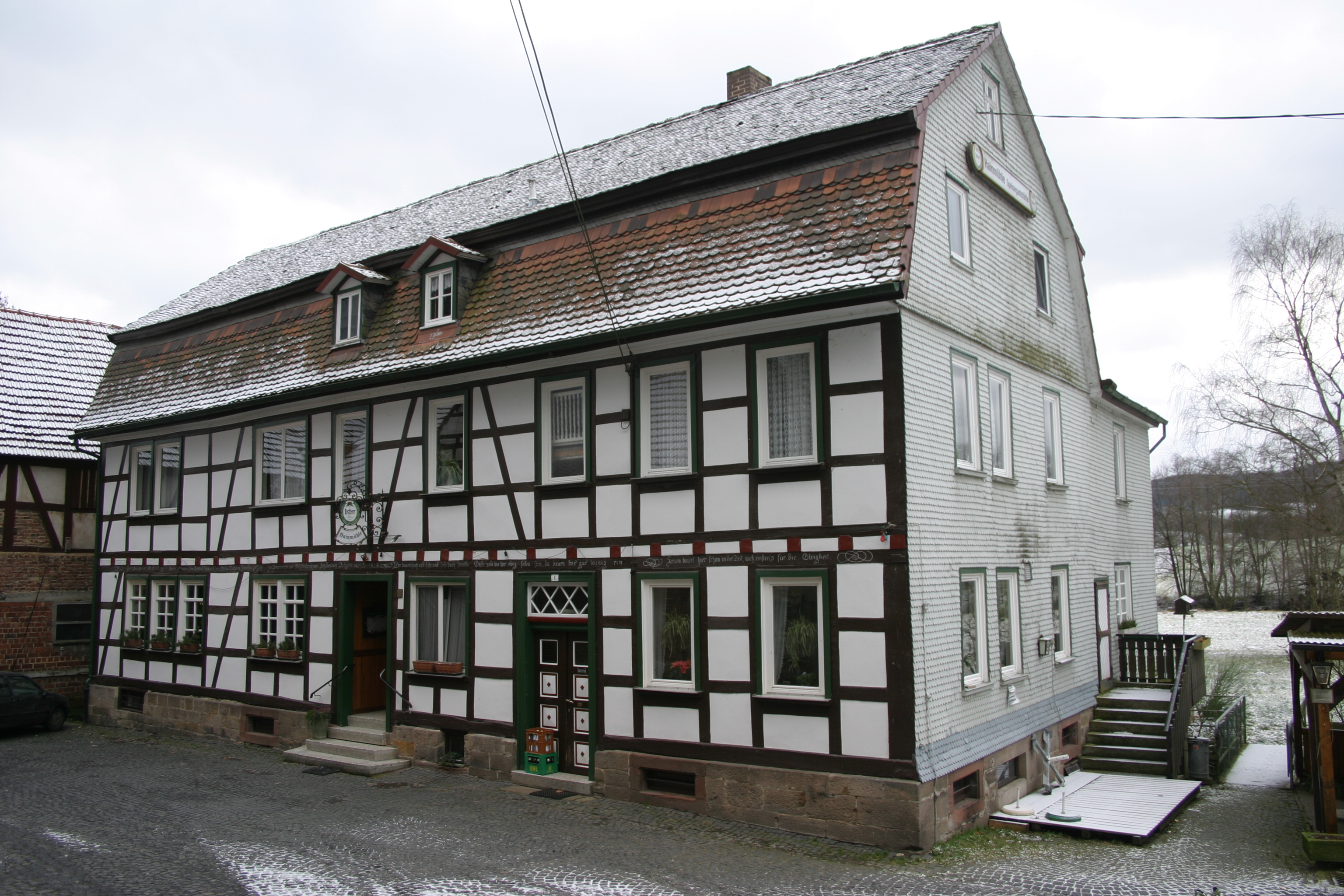 Hainmühle Homberg/Ohm 24.01.2005